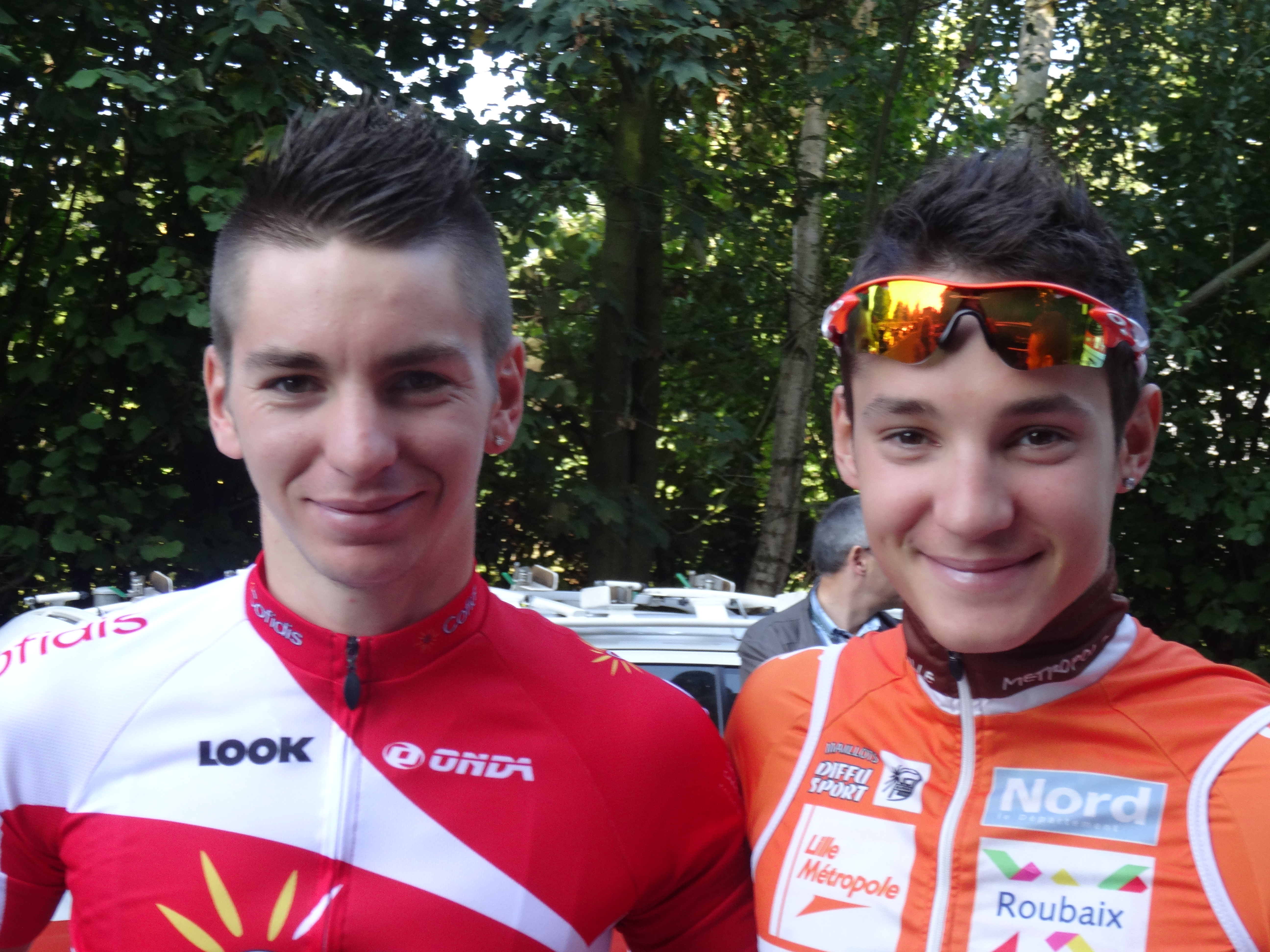 Reportage photographique réalisé le vendredi 3 octobre à l'occasion du départ de la deuxième étape de l'Eurométropole Tour 2014 à Estaimbourg (Estaimpuis), Belgique.